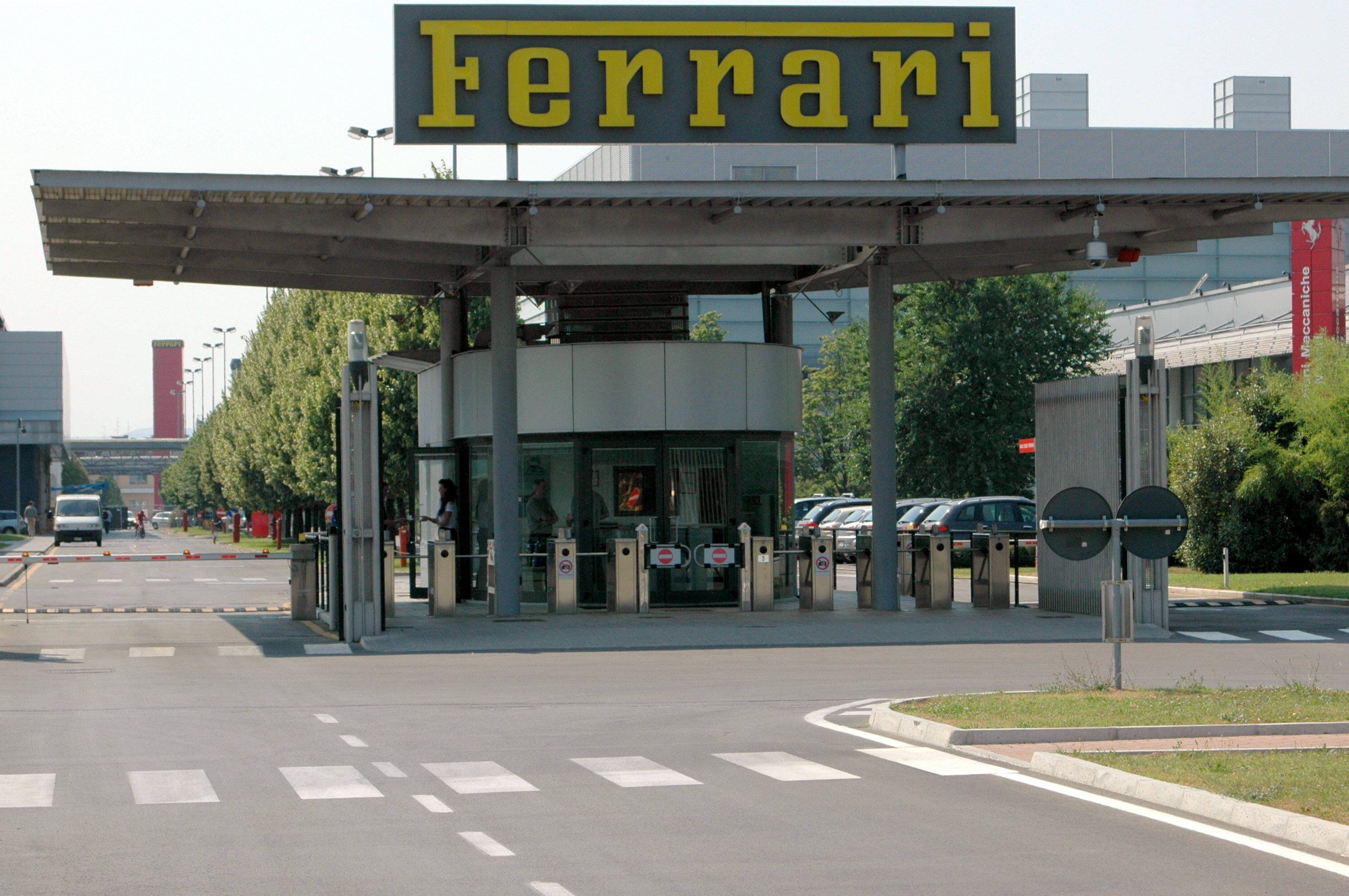 Maranello, Emilia Romagna, Italia